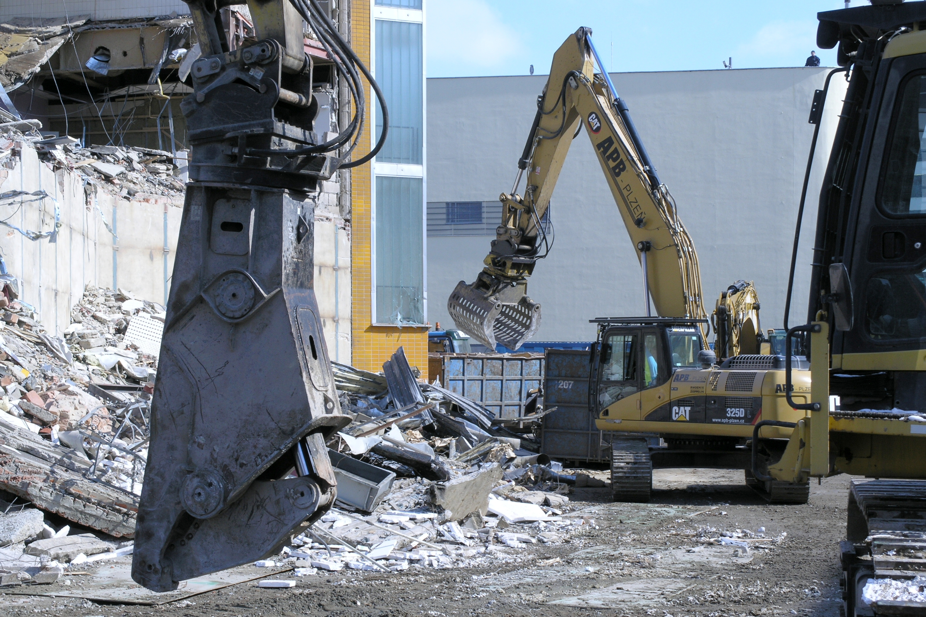 Demolice obchodního domu Ještěd v Liberci